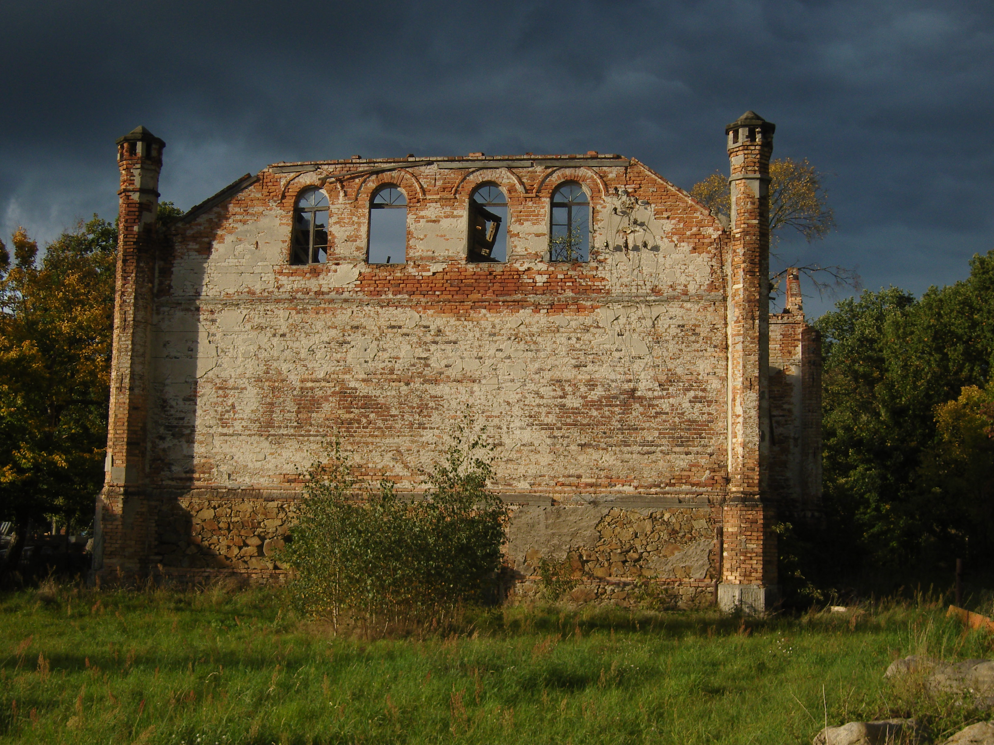 Ruine des ehemaligen Gutshaus im Senftenberger Ortsteil Niemtsch